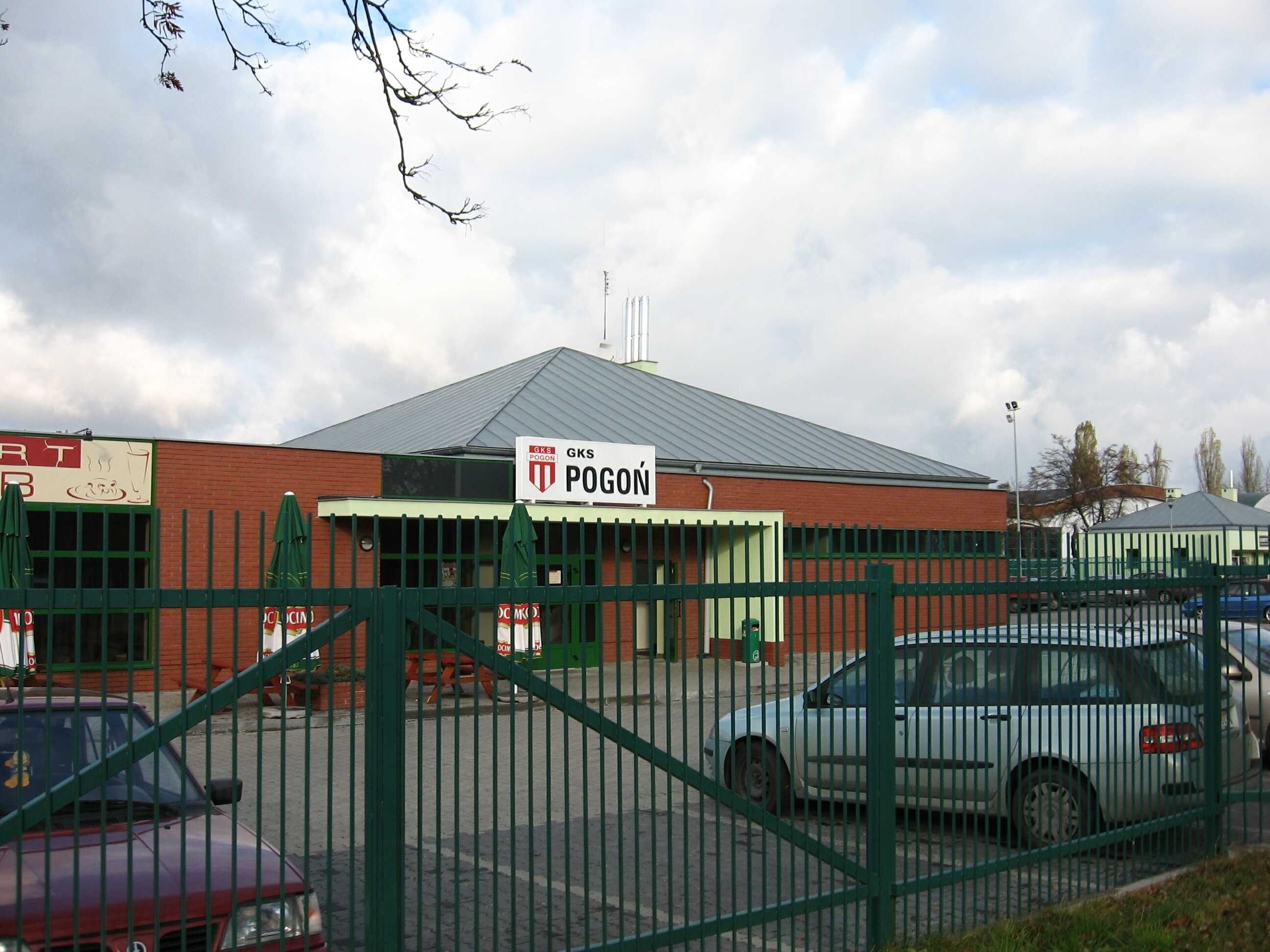 Local soccer club GKS Pogoń located in Grodzisk Mazowiecki